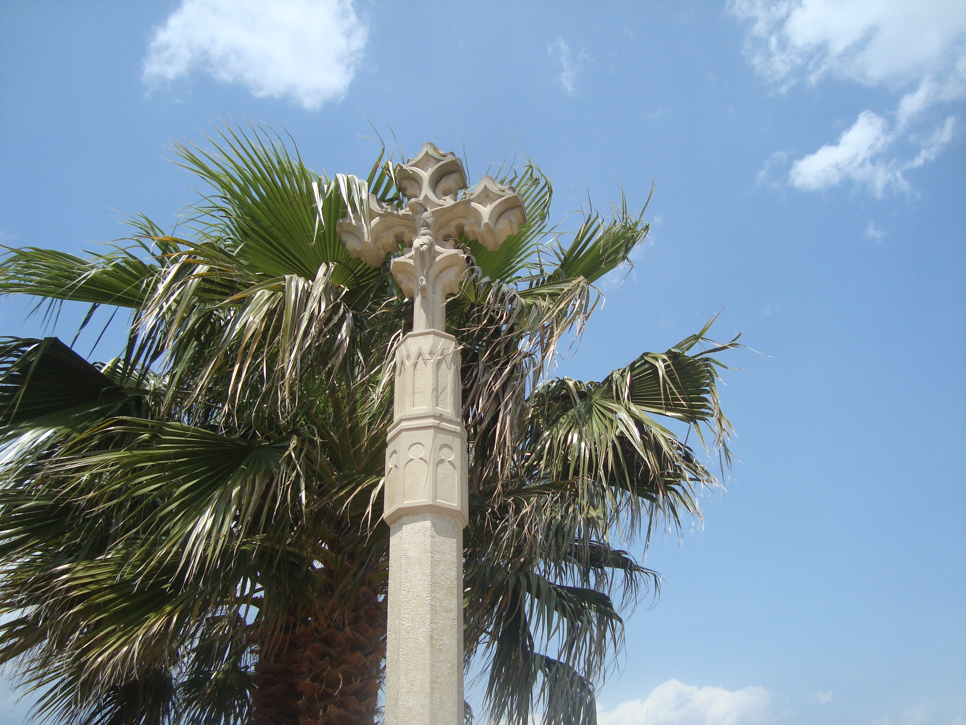 Peiró, creu de terme (La Jana)